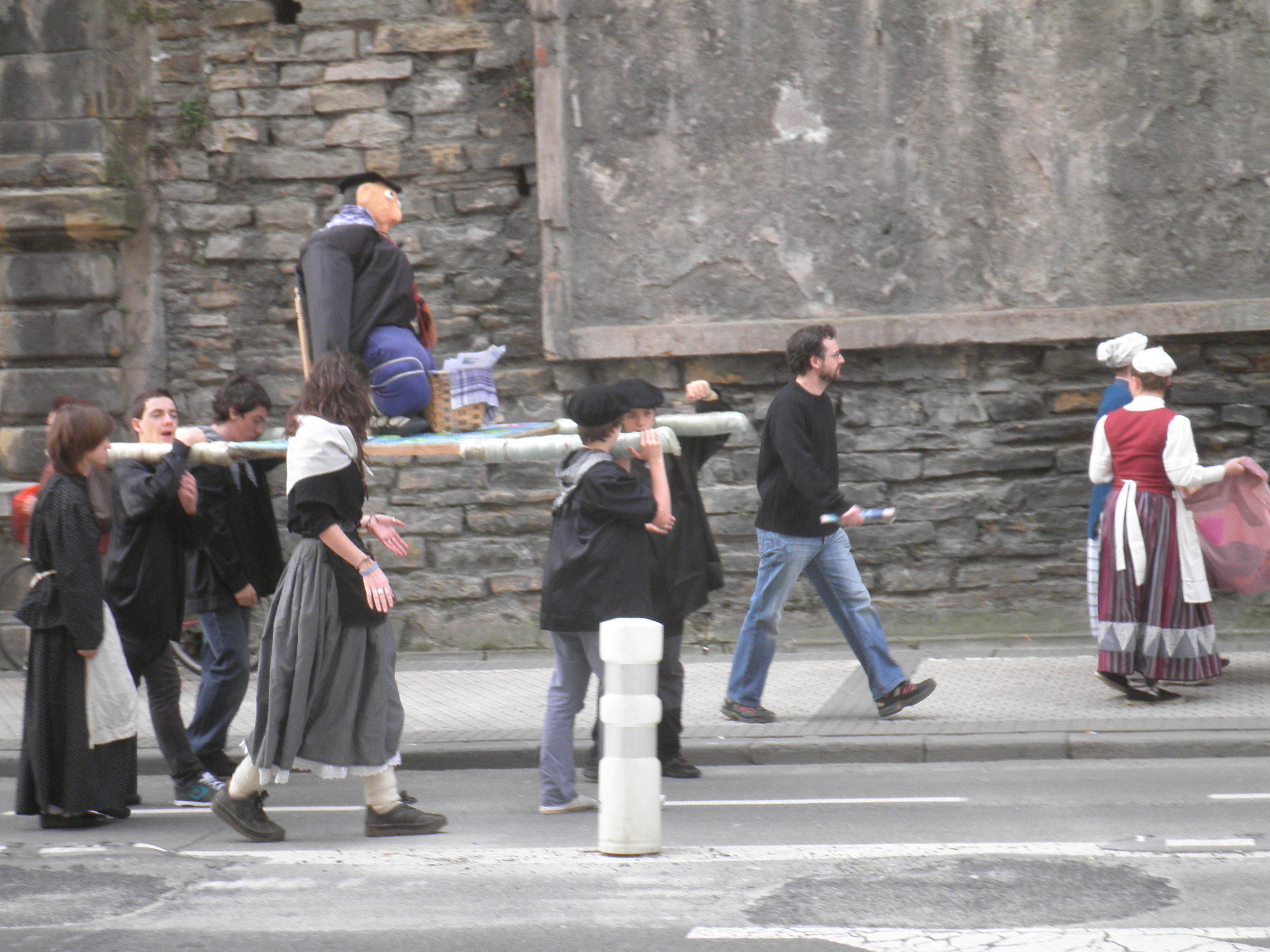 Olentzero. Amara Zaharra. 2012.